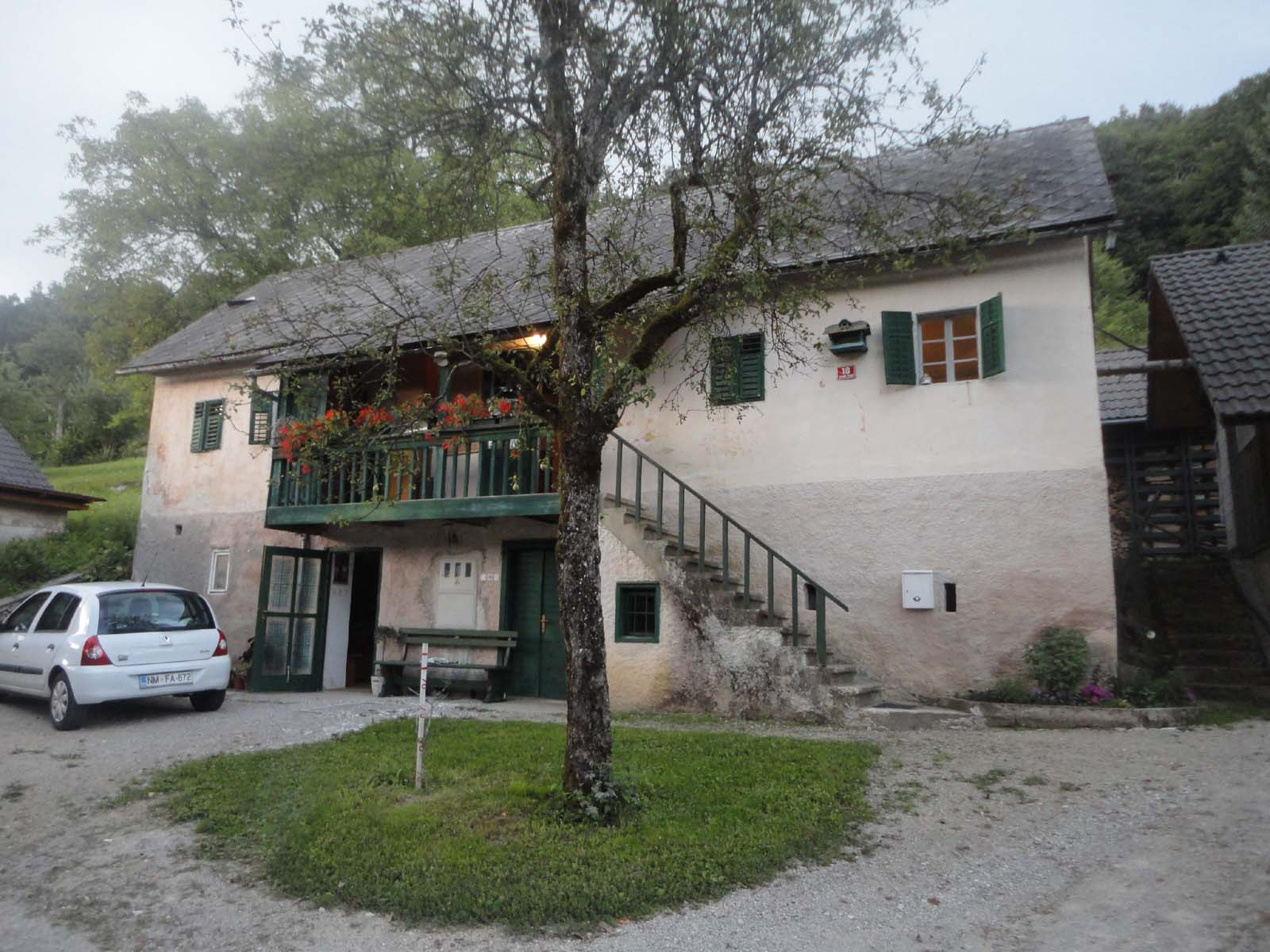 Kočevarska hiša z gankom v Starih Žagah